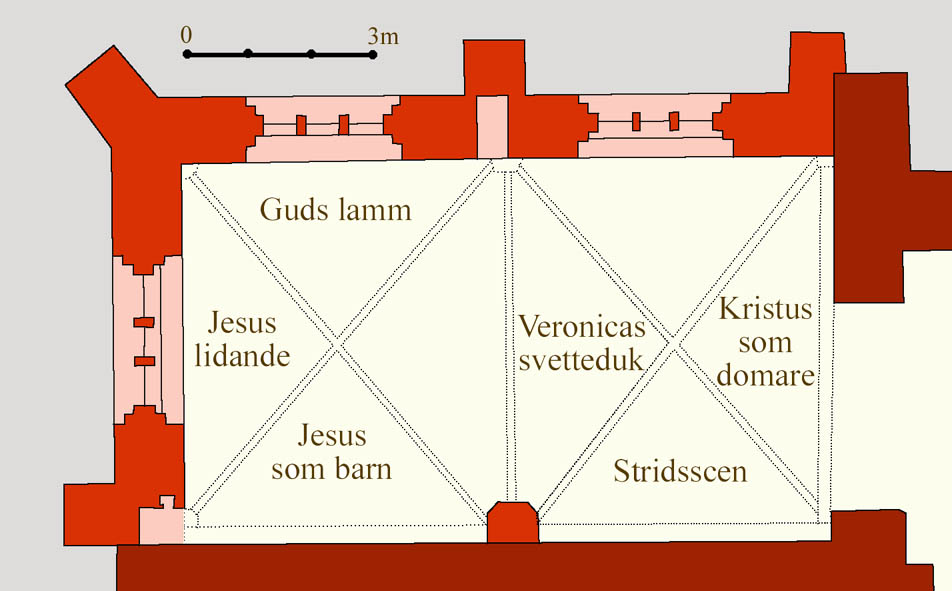 Plan over the Krämare chapel in St Peter church, Malmö. Sweden..